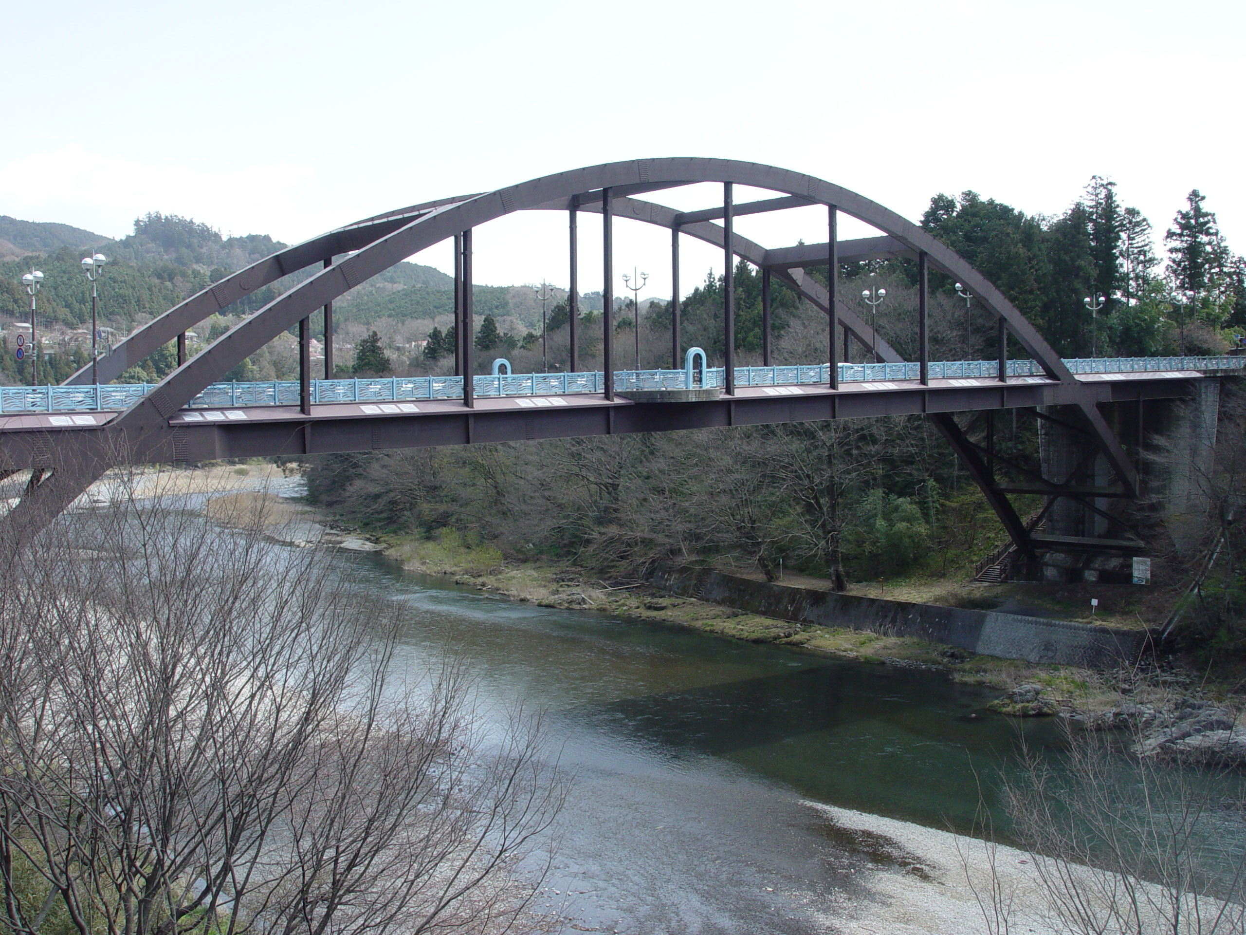 Ikusabata Ohashi Bridge, Tama River, Ome ja: 多摩川軍畑大橋